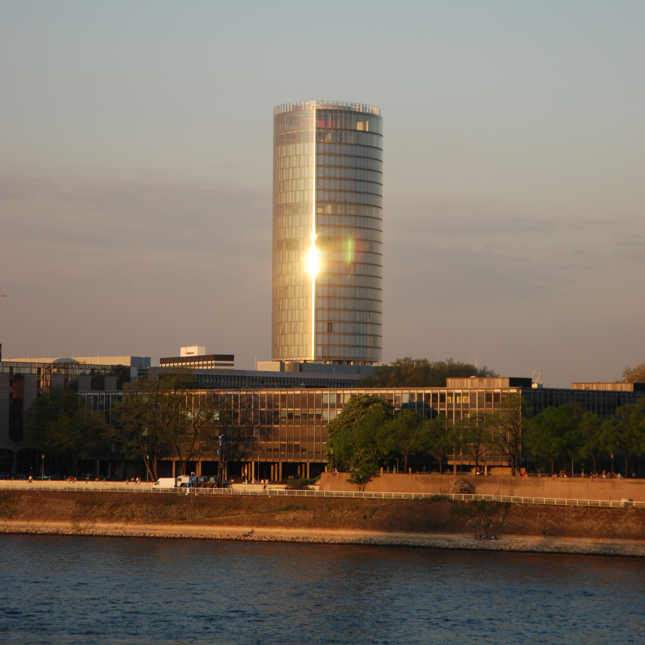 CologneTriangle